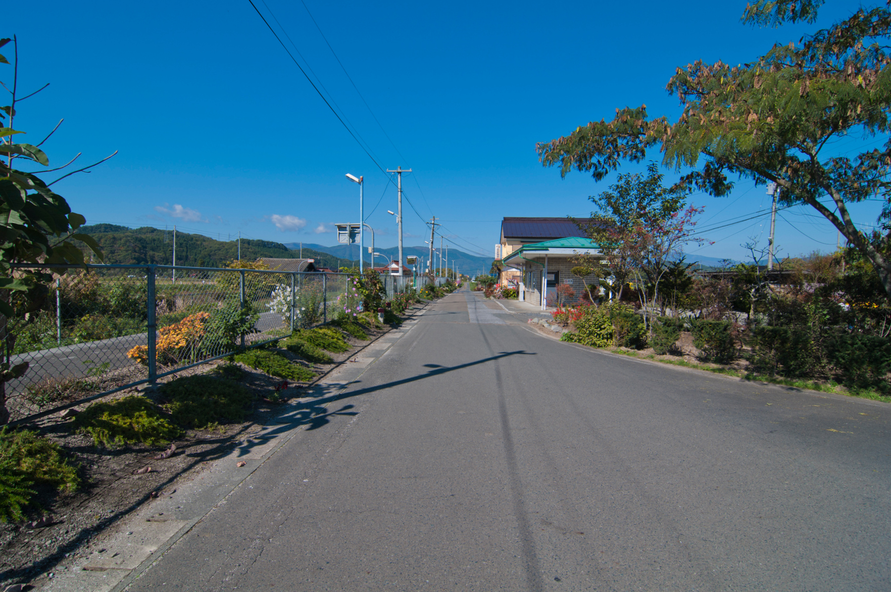 東日本旅客鉄道釜石線青笹駅